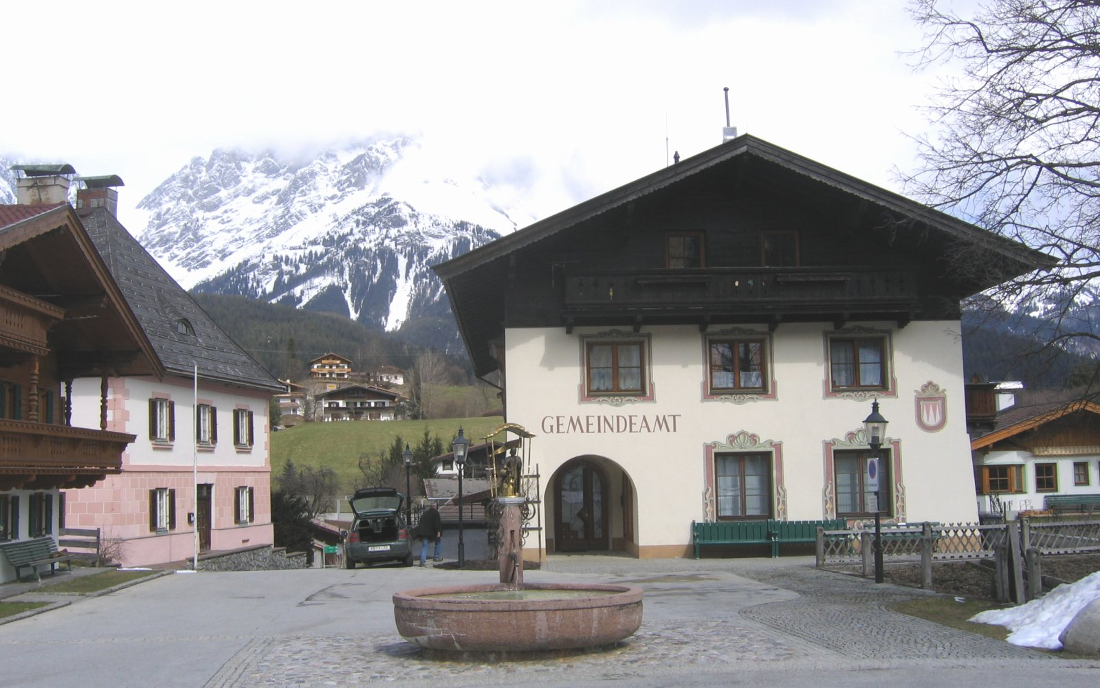 Going am Wilden Kaiser, Gemeindeamt